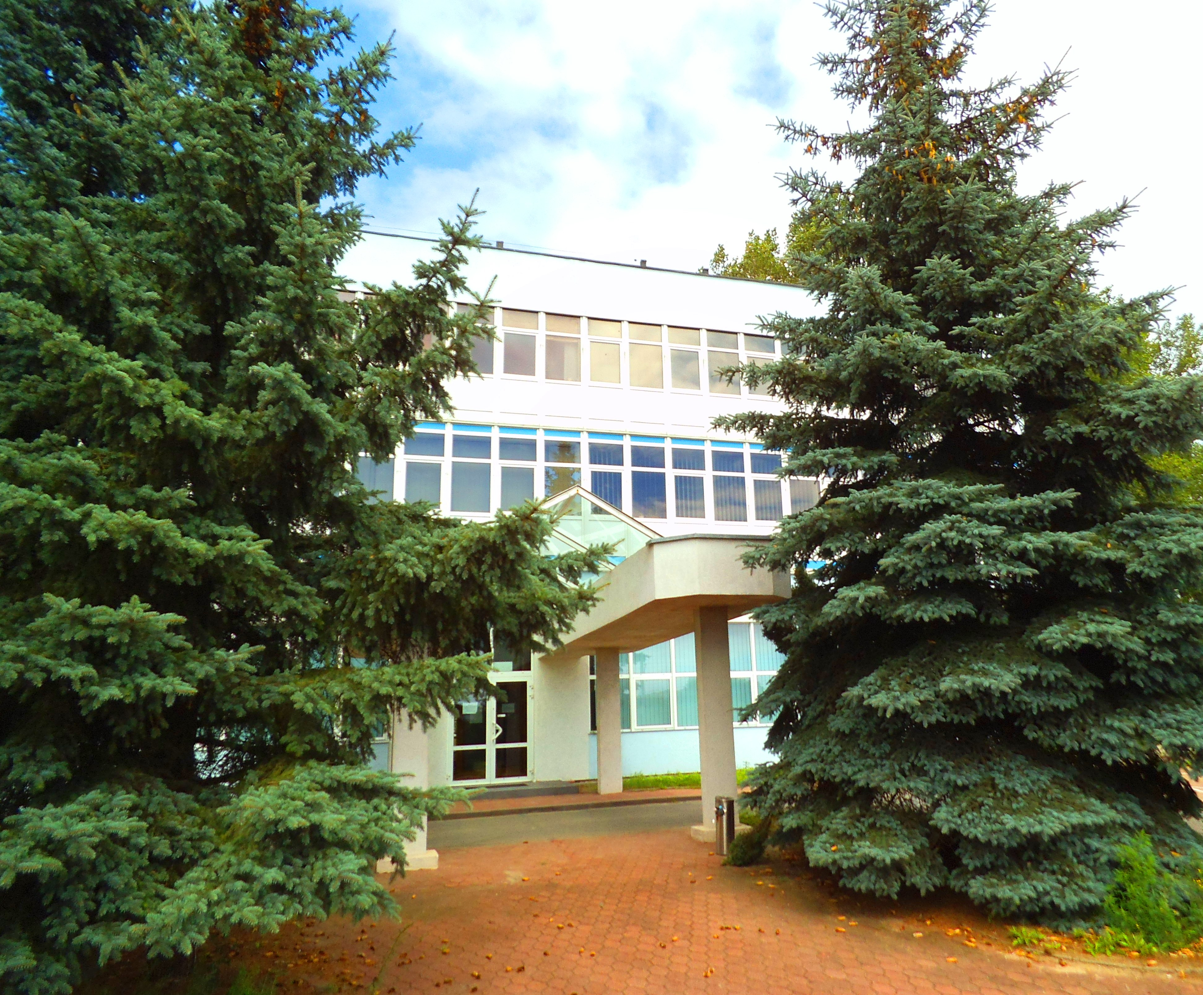 Dawny biurowiec Elany w Toruniu5